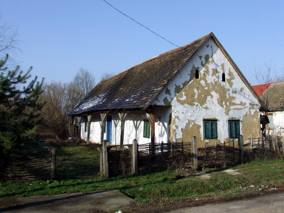 Drávakeresztúr régi ház